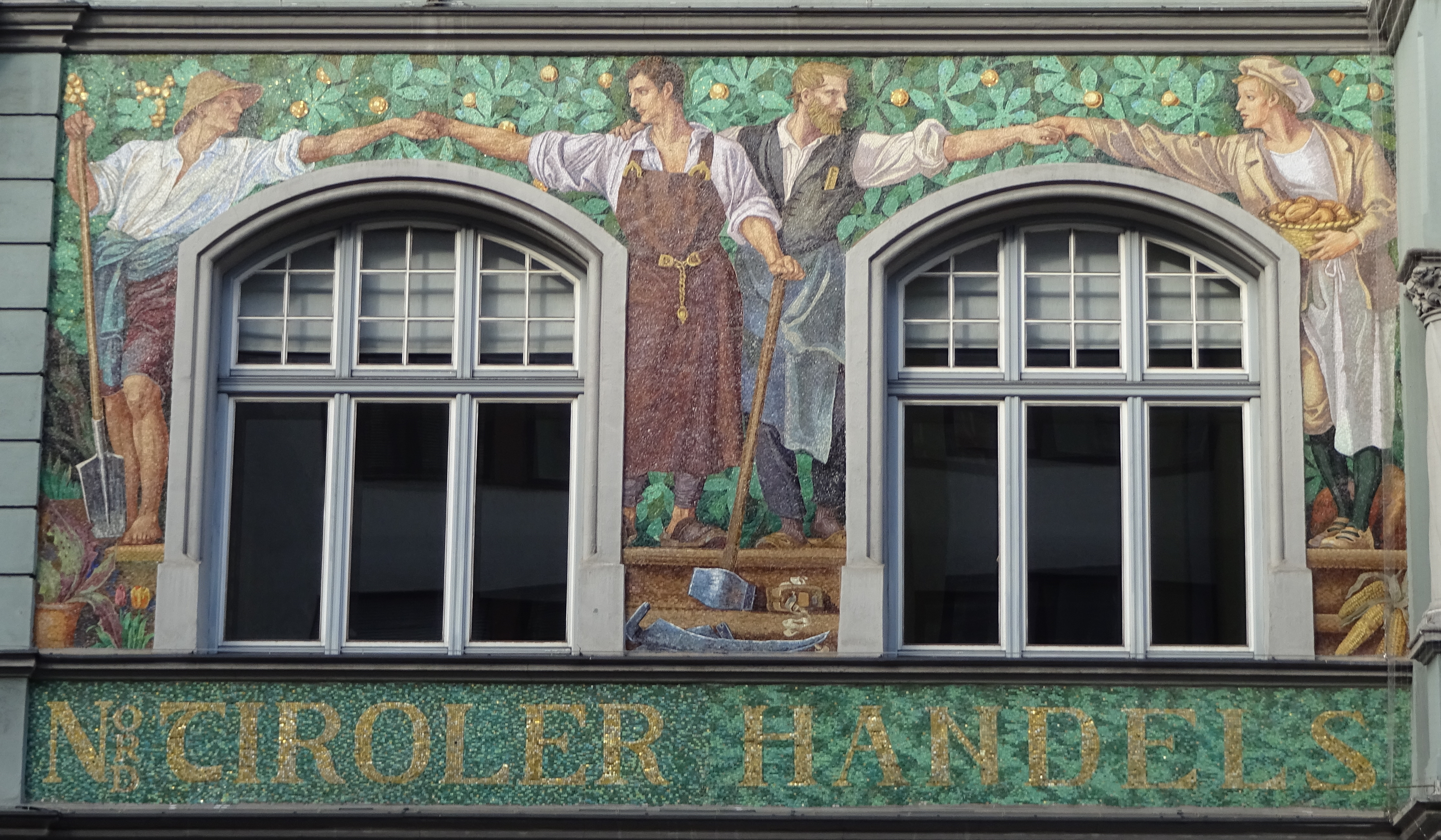 Handelskammer, Innsbruck: Mosaikfries auf der linken Seite von Alfons Siber (1906): Gärtner und Schmied, Tischler und Bäcker This media shows the remarkable cultural object in the Austrian state of Tyrol listed by the Tyrolean Art Cadastre with the ID 116150. (on tirisMaps, pdf, more images on Commons)